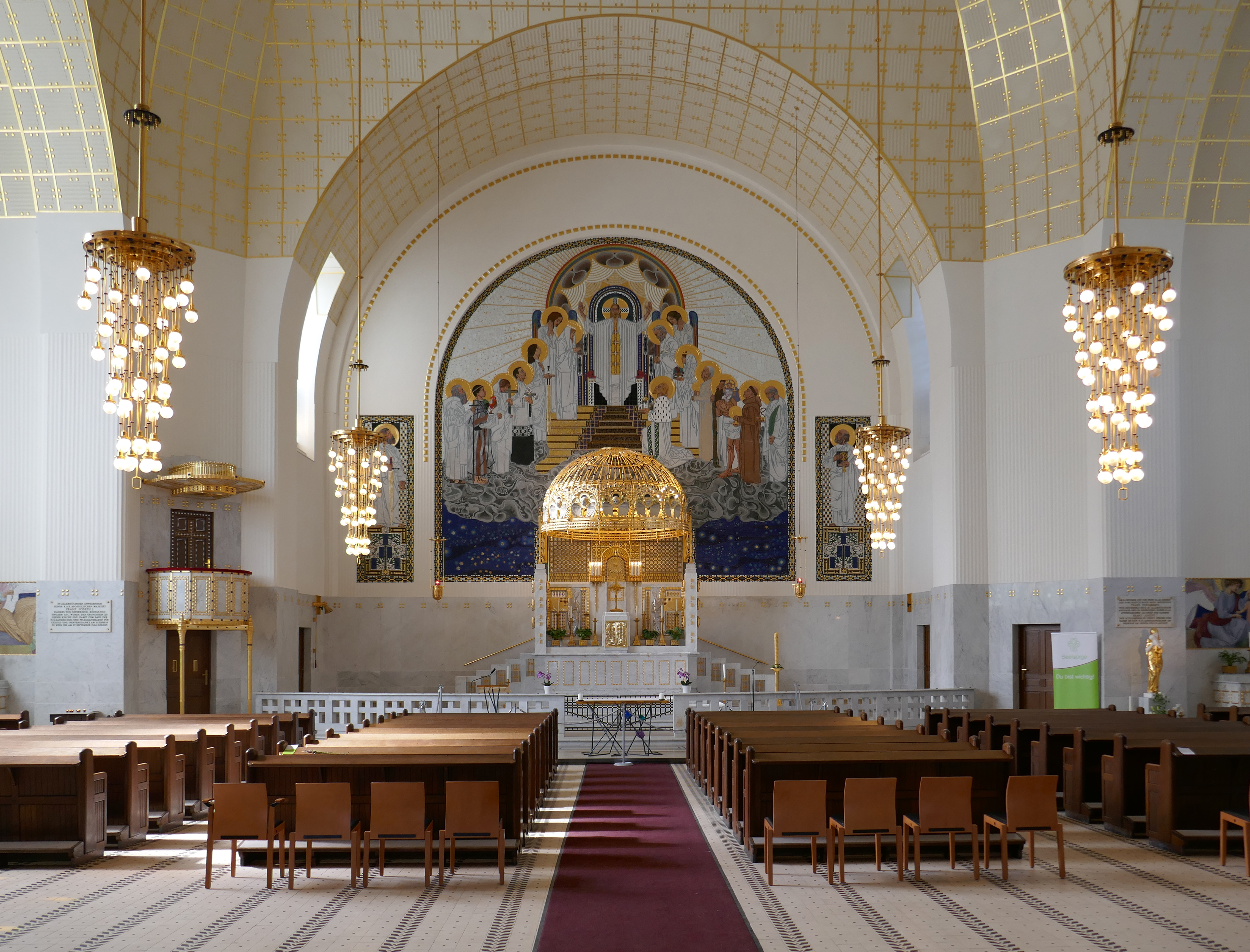 Im Inneren der Otto-Wagner-Kirche, Wien - Altarbild von Leopold Forstner.